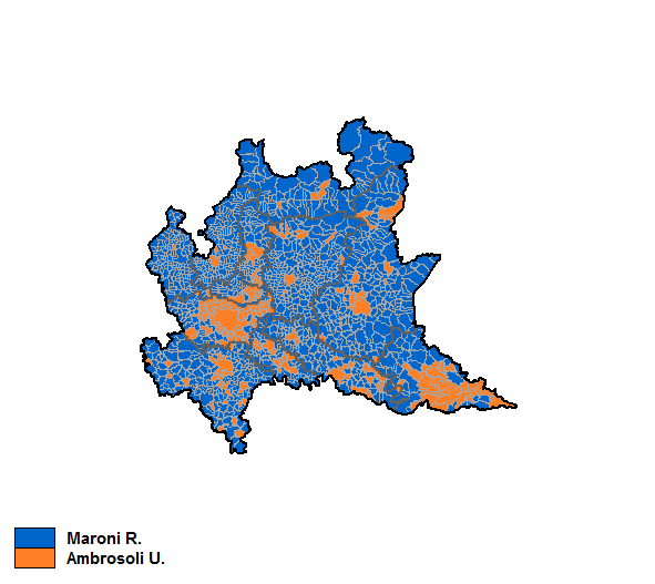 Candidati vincitori nei singoli comuni nelle elezioni regioni in Lombardia del 2013.